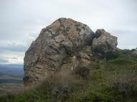 Es una roca de la cima